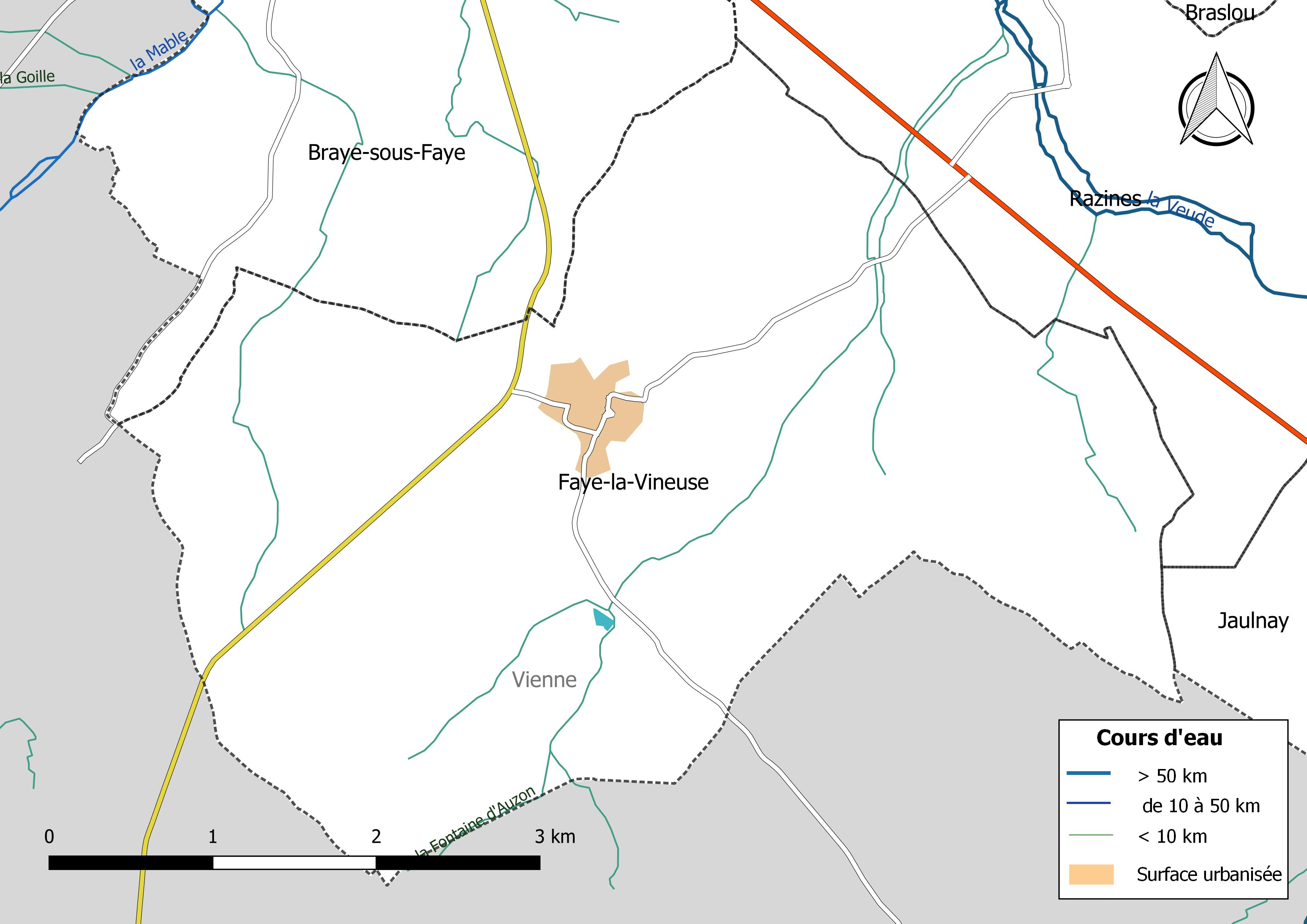 Carte du réseau hydrographique de la commune de Faye-la-Vineuse (France).